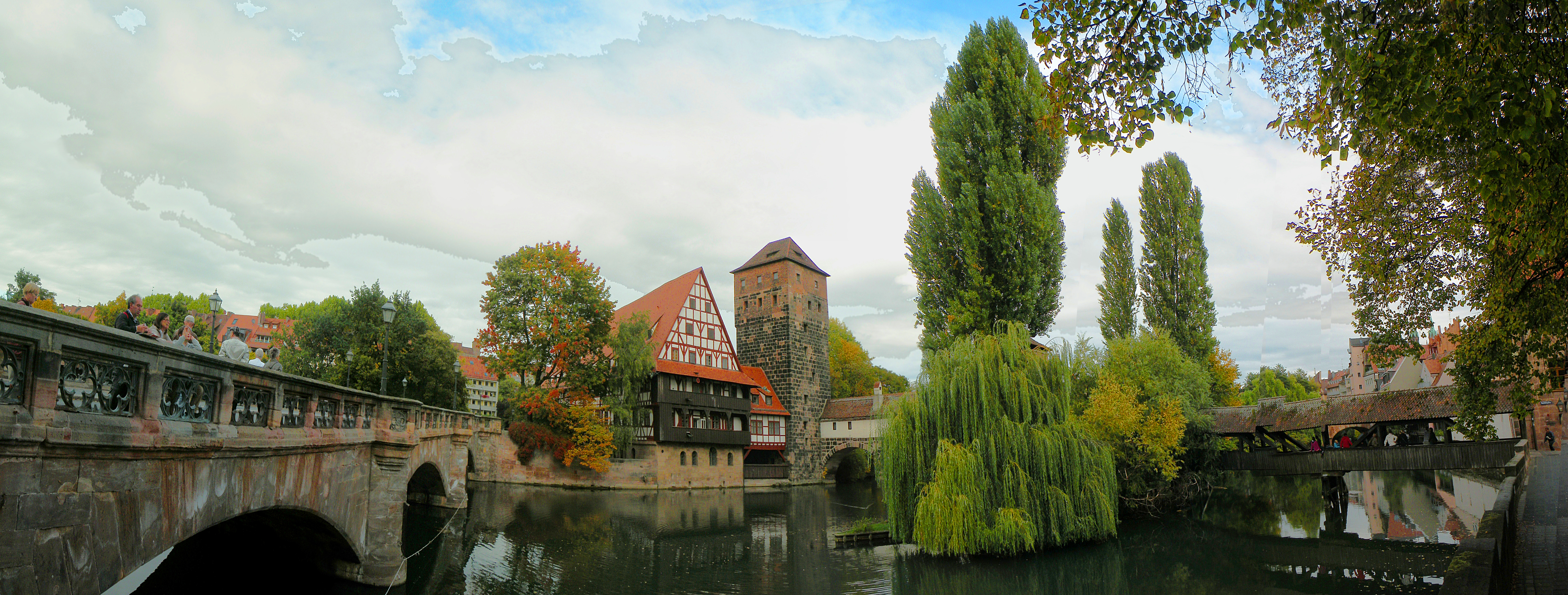 Nuremberg.Pegnitz and Hangmans tower.jpg